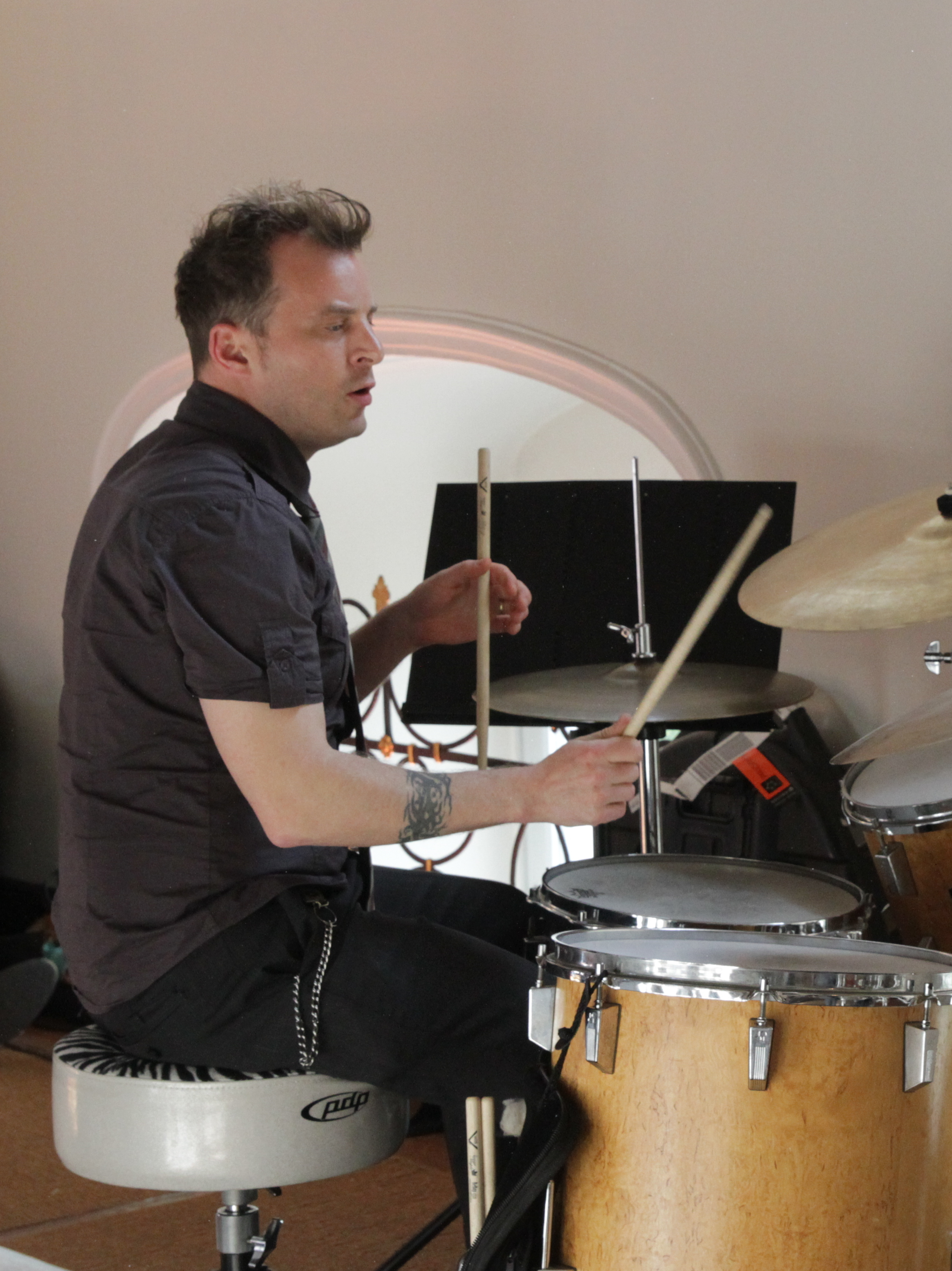 Tonspuren 2014 - Jochen Rückert am Schlagzeug Festivalsommer This photo was created with the support of donations to Wikimedia Deutschland in the context of the CPB project "Festival Summer". This file is made available under the Creative Commons CC0 1.0 Universal Public Domain Dedication. The person who associated a work with this deed has dedicated the work to the public domain by waiving all of their rights to the work worldwide under copyright law, including all related and neighboring rights, to the extent allowed by law. You can copy, modify, distribute and perform the work, even for commercial purposes, all without asking permission. Thomas Springer Personality rights warningAlthough this work is freely licensed or in the public domain, the person(s) shown may have rights that legally restrict certain re-uses unless those depicted consent to such uses. In these cases, a model release or other evidence of consent could protect you from infringement claims.